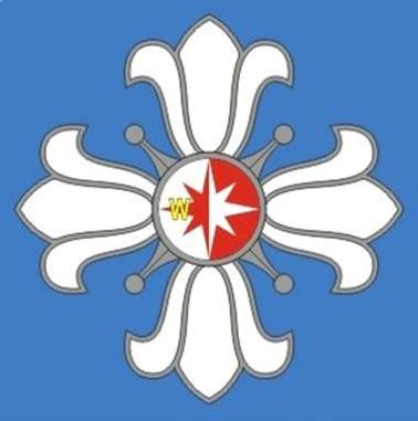 Naiskodukaitse Lääne ringkonna lipp